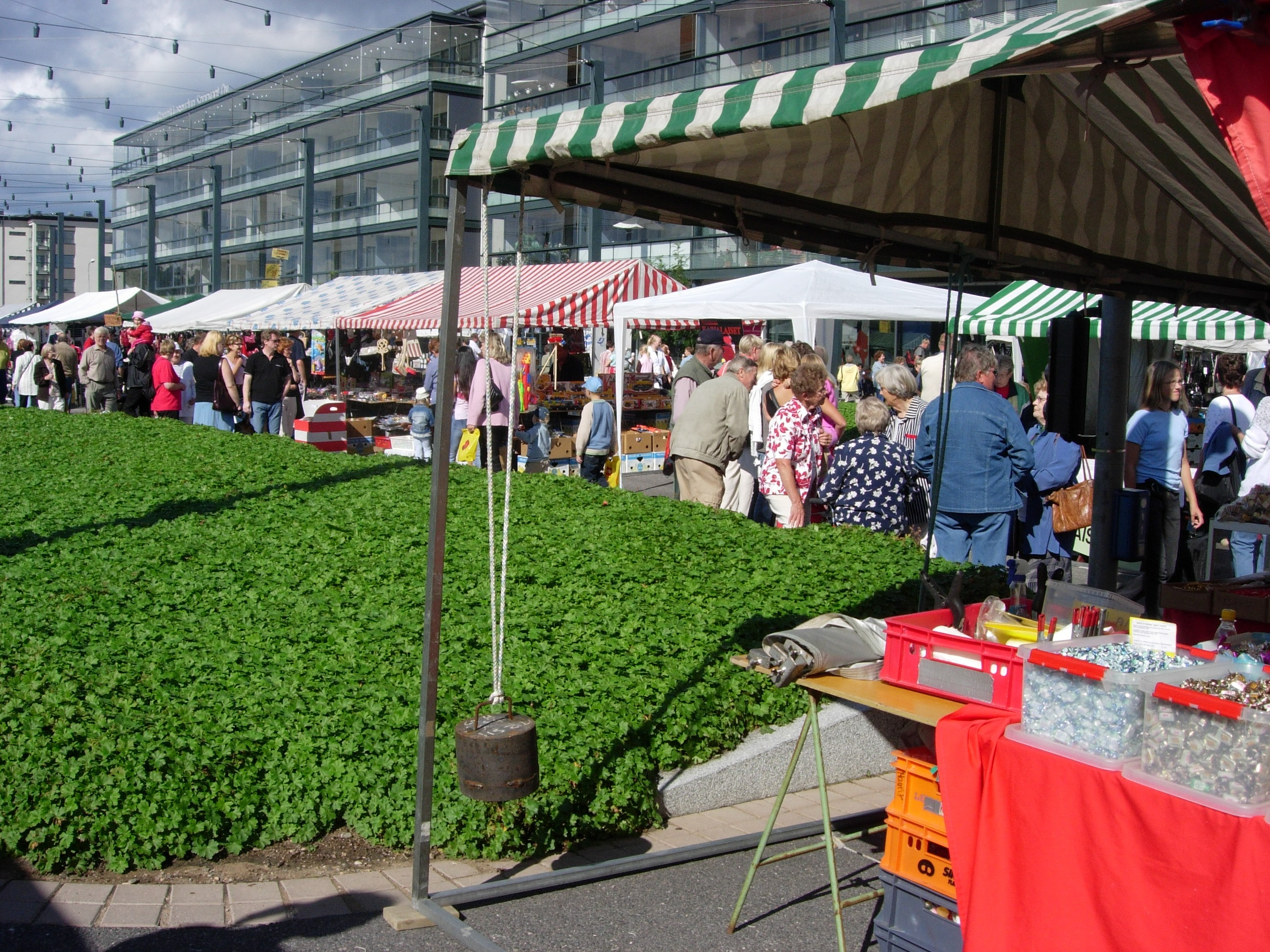 Killin markkinat Raisio-päivillä